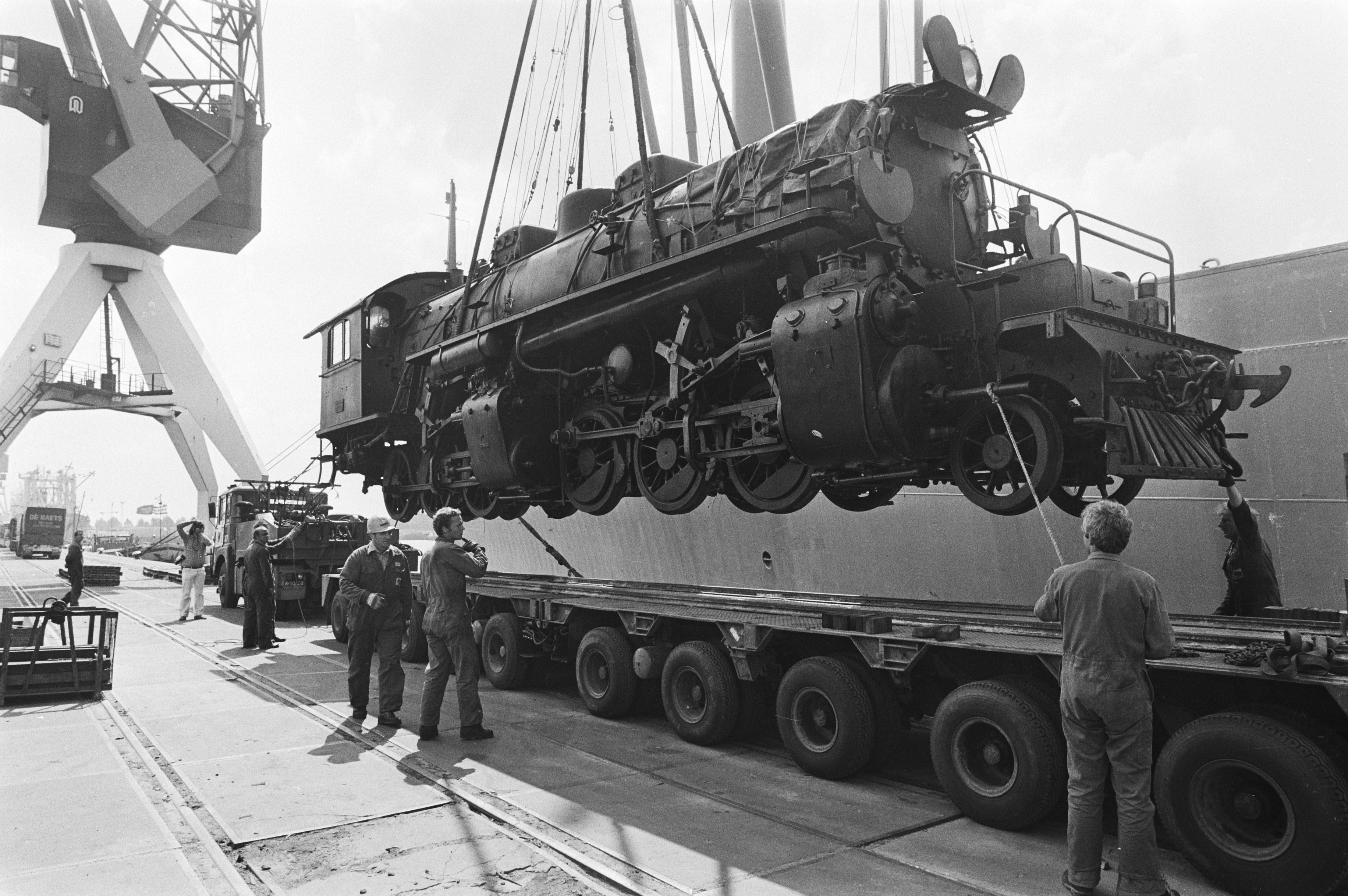 Collectie / Archief : Fotocollectie Anefo Reportage / Serie : [ onbekend ] Beschrijving : Oude "Mallet" stoomlocomotief Indonesische Staatsspoorwegen aangeb Spoorwegmuseum (Utrecht); de locomotief bijna op de grond Datum : 23 juli 1981 Locatie : Rotterdam, Utrecht Trefwoorden : locomotieven Instellingsnaam : Spoorwegmuseum Fotograaf : Dijk, Hans van / Anefo Auteursrechthebbende : Nationaal Archief Materiaalsoort : Negatief (zwart/wit) Nummer archiefinventaris : bekijk toegang 2.24.01.05 Bestanddeelnummer : 931-6013 Reacties Geplaatst door Geschiedenismens - treinen op 23 september 2017 - 11:22. Schip 'Wissekerk' van Nedlloyd vervoerde de 67 ton wegende 'Mallet' Locatie: Beatrixhaven Plaats: Rotterdam, Zuid-Holland NB. 'Mallet CC 5022'. De locomotief was in de jaren 20 in Nederland gebouwd bij Werkspoor en heeft jaren op het eiland Java (Ned. Indië - Indonesië) dienst gedaan.